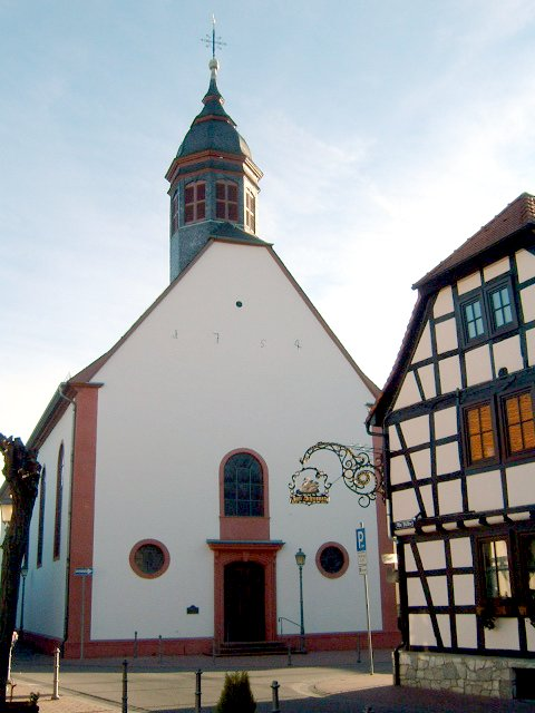 Schwalbach am Taunus, Katholische Pfarrkirche St. Pankratius von 1754